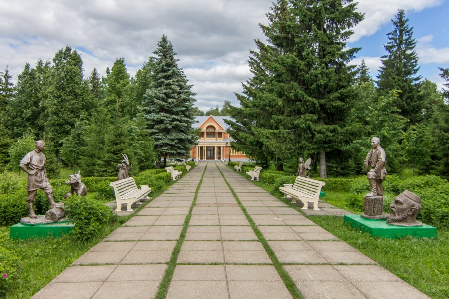 Лес Тукай-Кырлай: С. Новый Кырлай в 22 км от г. Арск,Новый Кырлай,Арский район, Татарстан This image is related to the protected area of Russia number 1610032